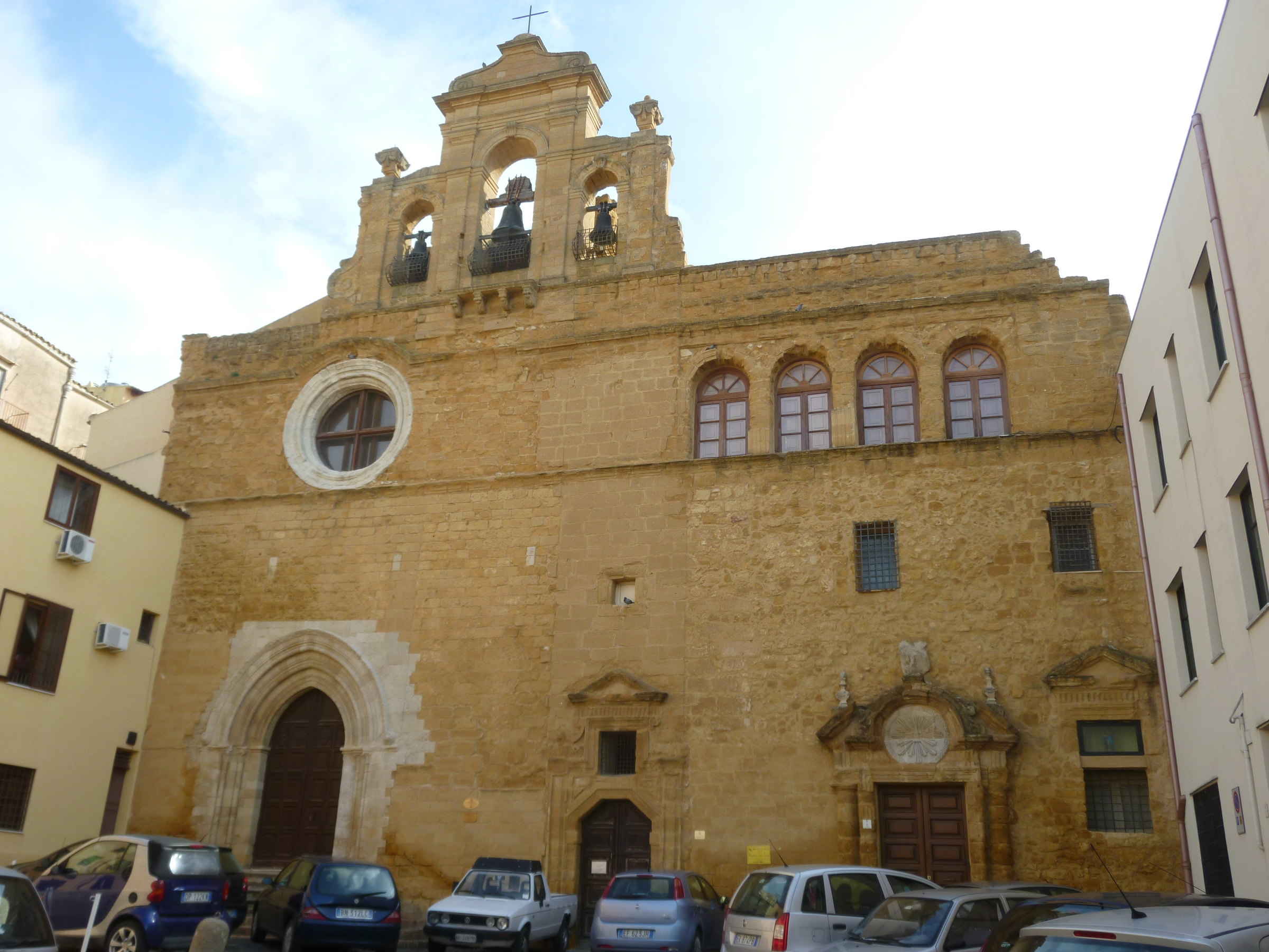 Chiesa di Santo Spirito, Agrigento